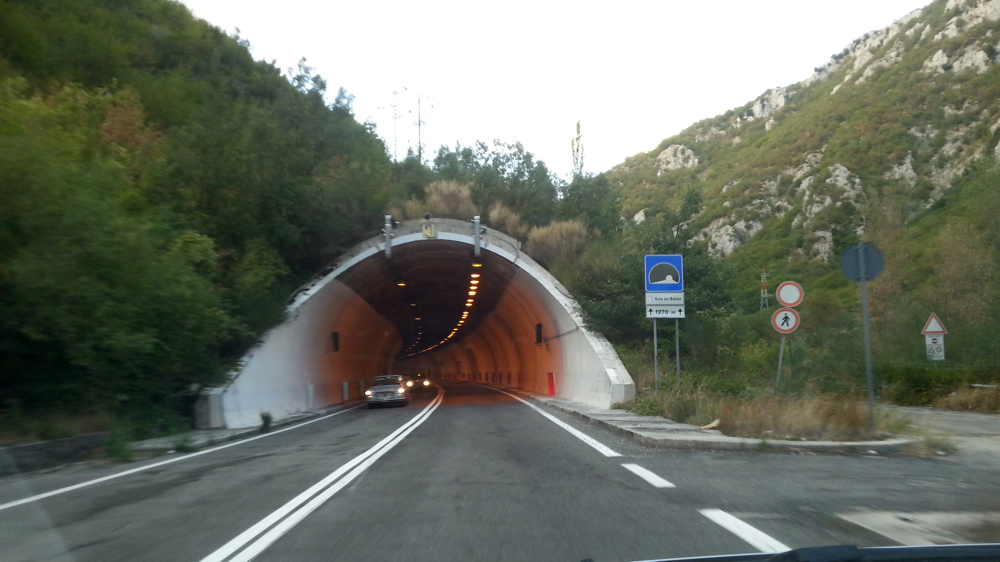 Portale sud della galleria Gole del Velino, tra Micigliano e Posta (provincia di Rieti), sulla strada statale 4 Via Salaria. Sulla destra è visibile il vecchio tracciato della Salaria dismesso nel 1994, dopo l'apertura al traffico della galleria